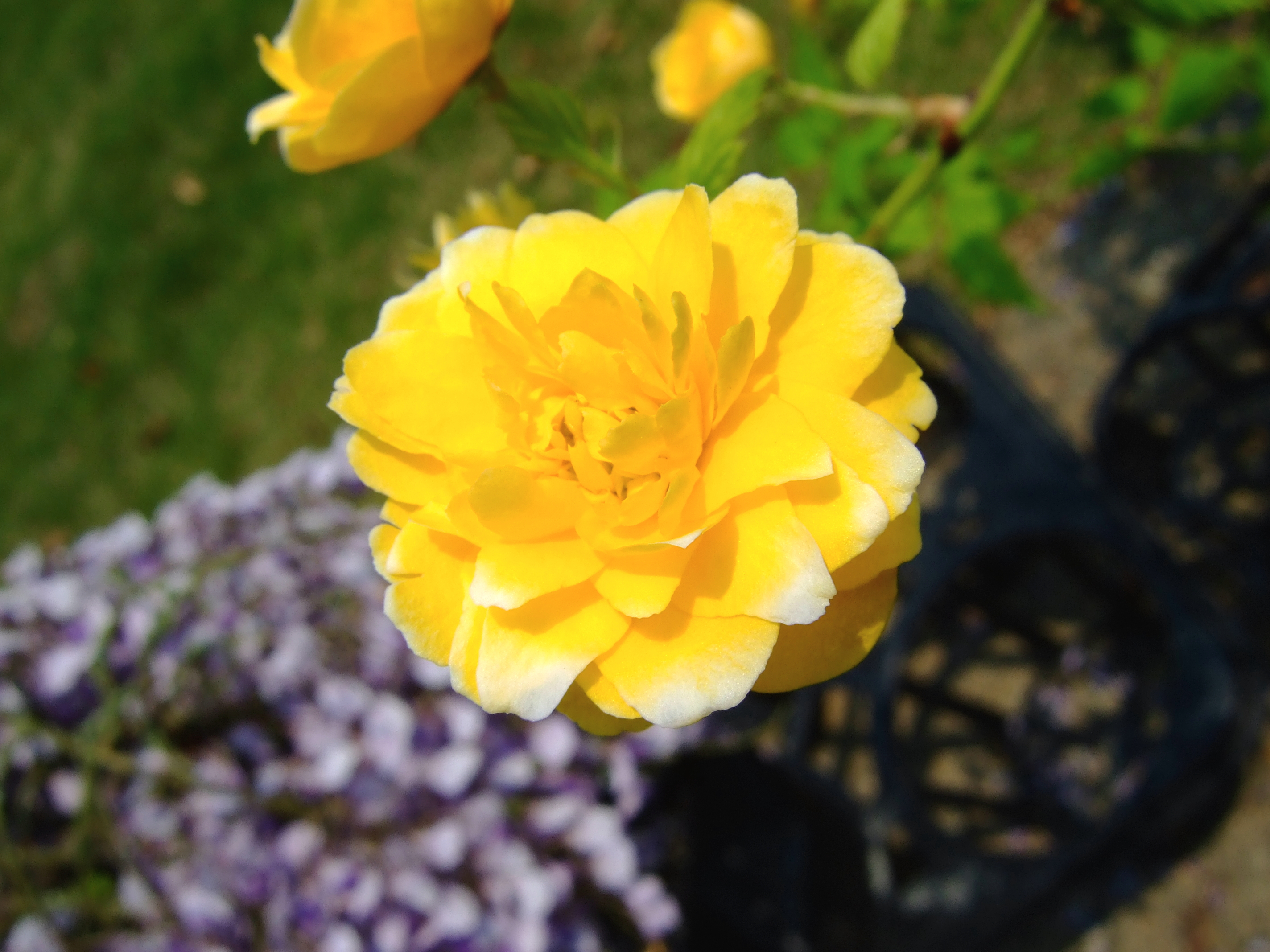 八重山吹 兵庫県立フラワーセンター